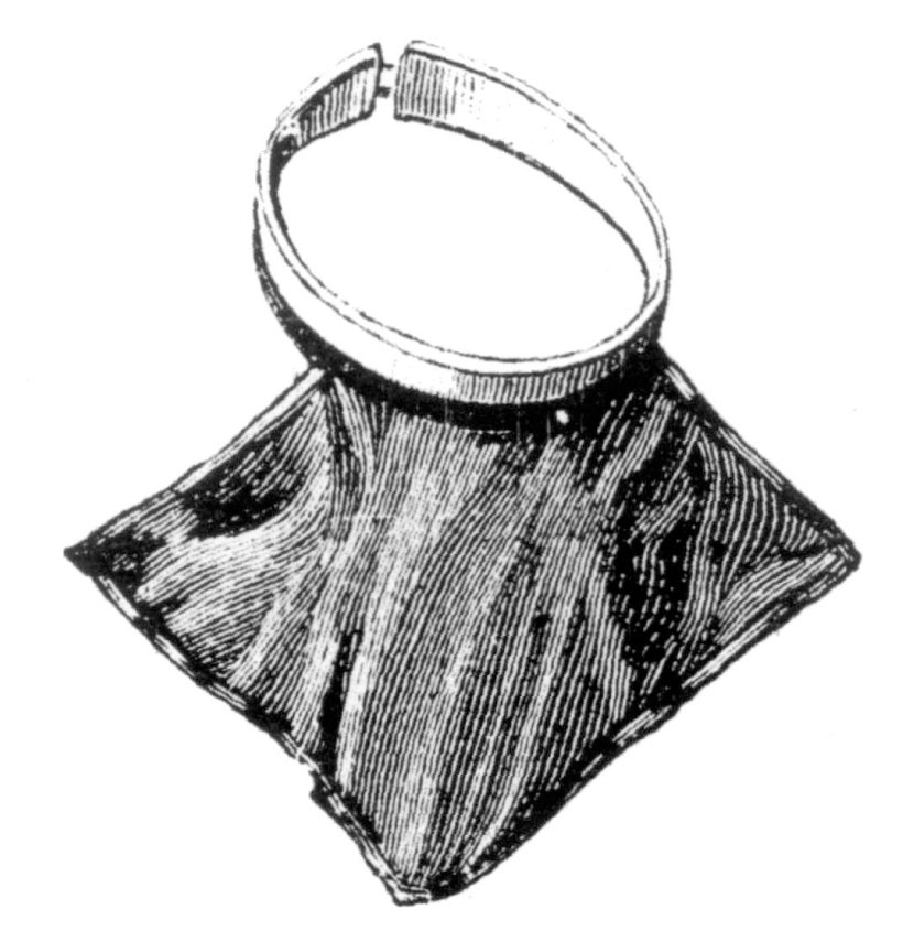 Col & collet